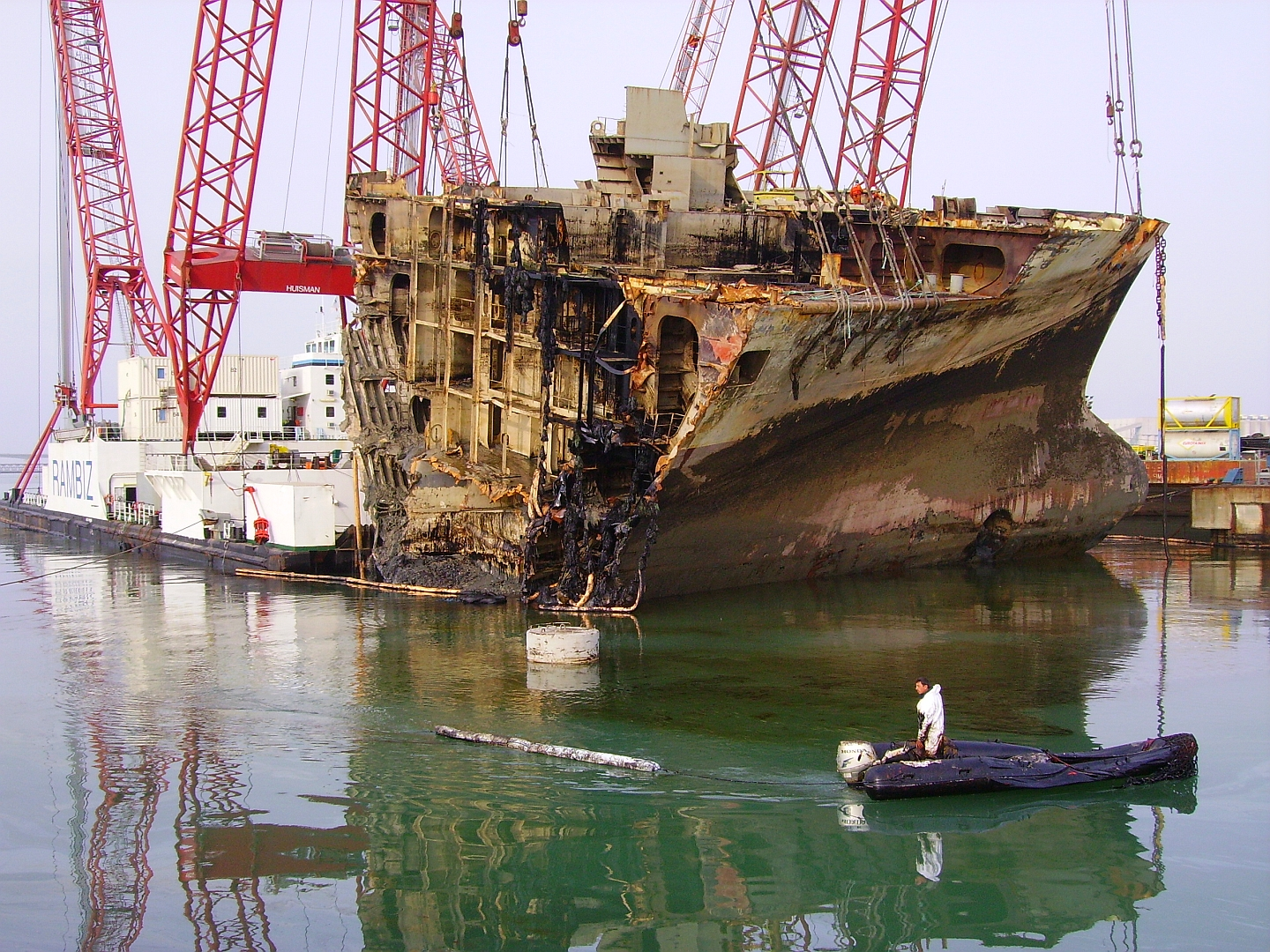 L'étrave du Rokia Delmas soulevée par la barge-grue Rambiz, au port de La Rochelle-Pallice le 28 octobre 2007. IMO Number: 9136199 MMSI Number: 205132000 Callsign: ORKA Length: 85 m Beam: 44 m